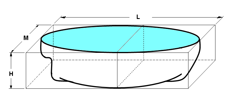 Area del plano de Floatción (spanish)(Buoyancy area)